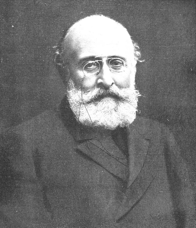 Retrato de Francisco Silvela, publicado en la revista española Nuevo Mundo.